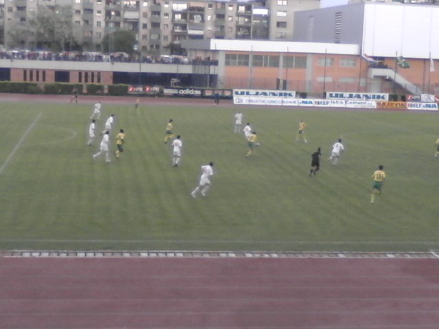 Utakmica između NK Istre 1961 i NK Mosora